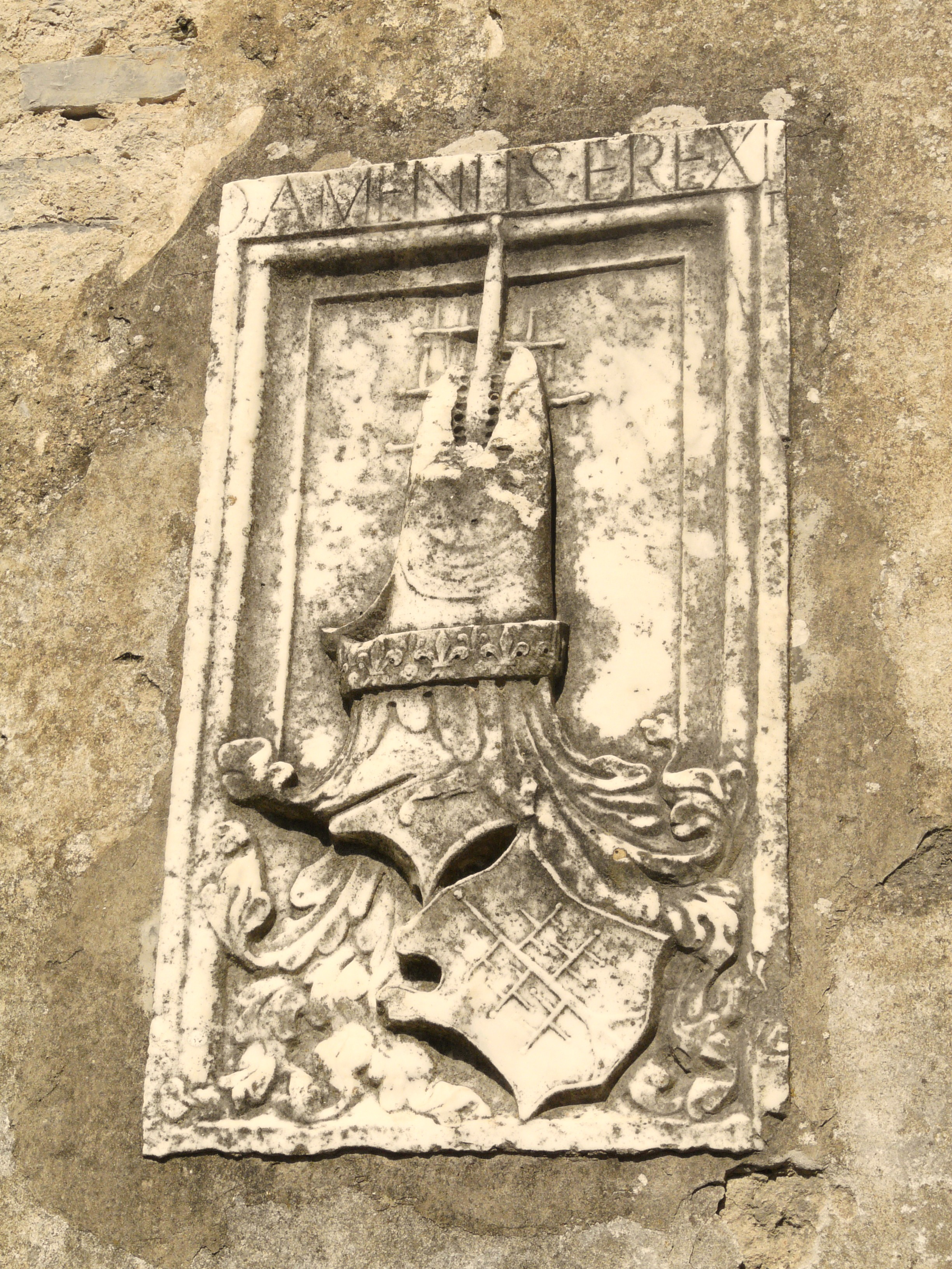 Castello Malaspina, Fosdinovo, Toscana, Italia